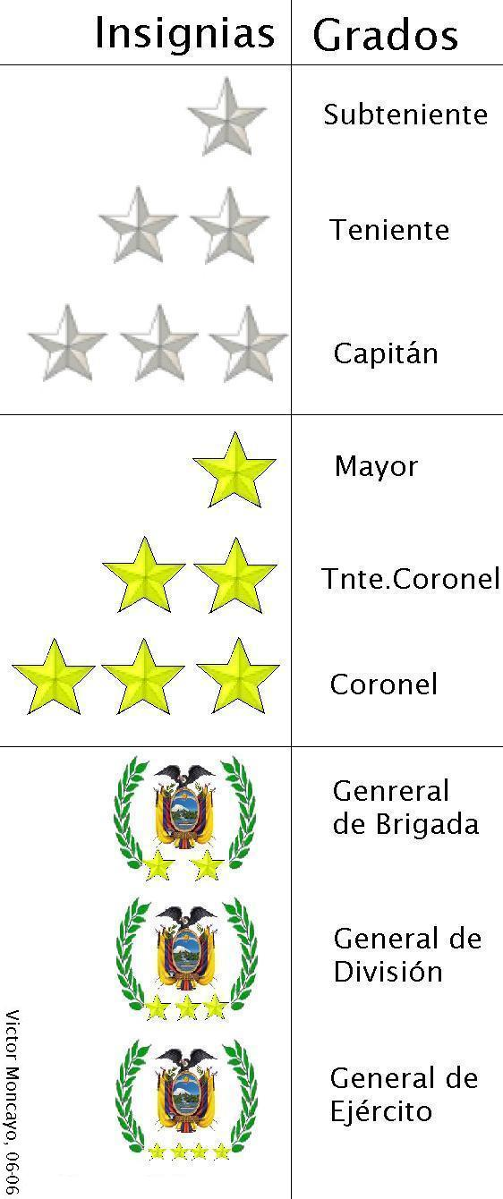 todas las insignias de los oficiales del ejercito del Ecuador, el autor pues soy yo, Victor Moncayo